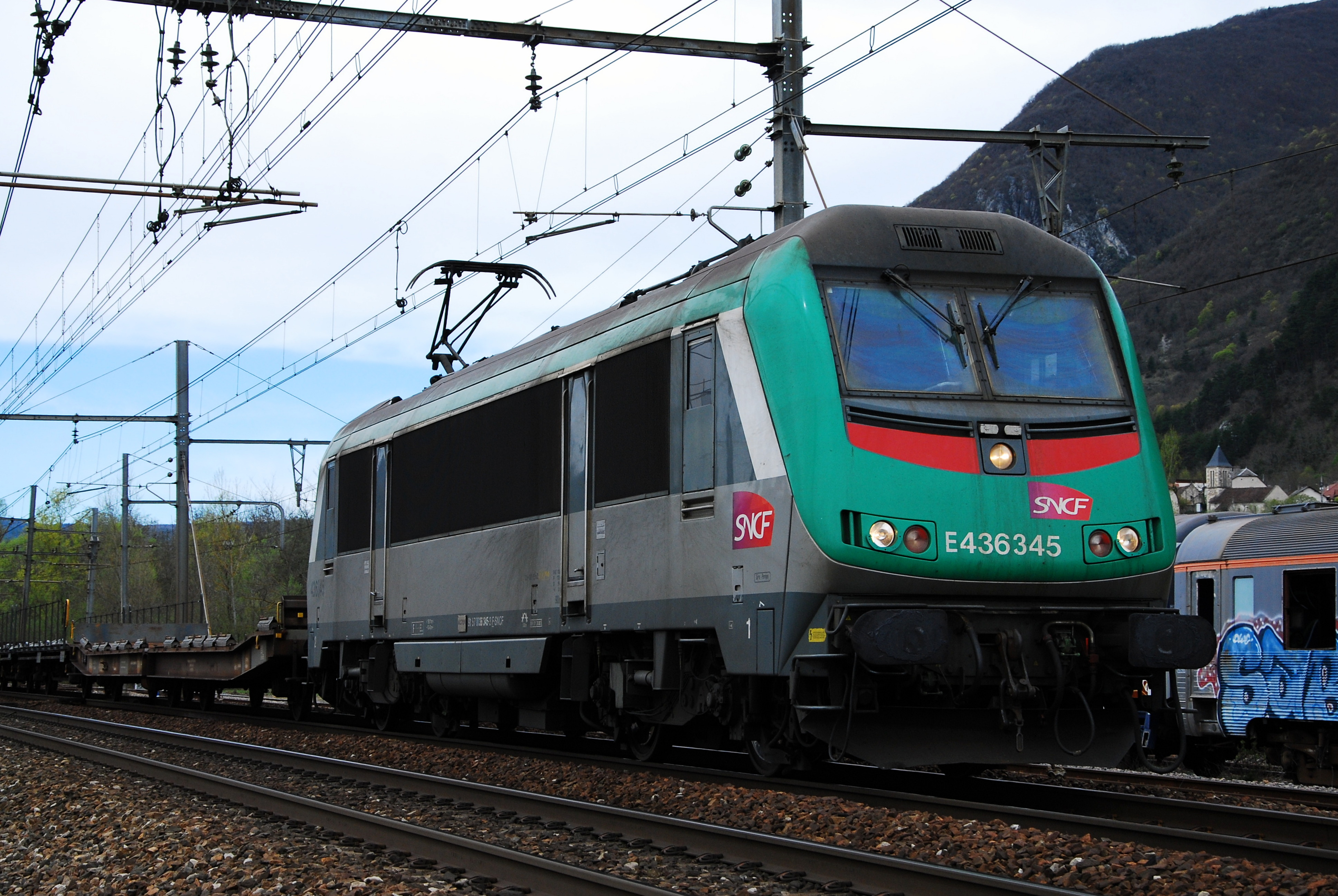 E436345 Culoz